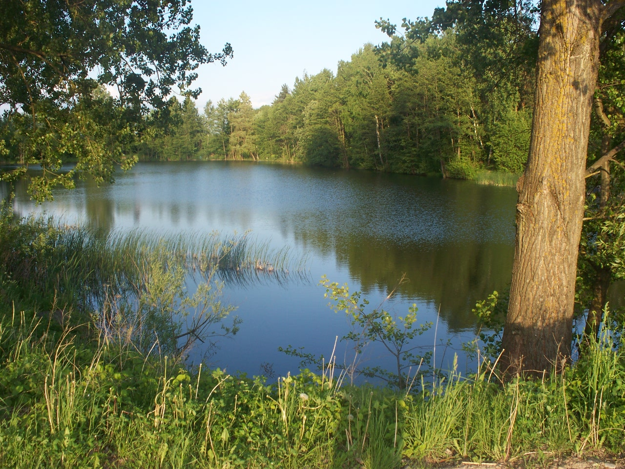 W 1925 roku (według innych źródeł w 1924 r.), została wybudowana w Szepietowie cegielnia przez Wacława Belcarza. Później wchodziła w skład Podlaskich Terenowych Zakładów Ceramiki Budowlanej w Białymstoku. Teren ten po wyeksploatowaniu gliny został zrekultywowany. Na fotografii jest widoczny największy staw , obecnie jest zarządzany przez koło wędkarskie nr 81 PZW Szepietowo.